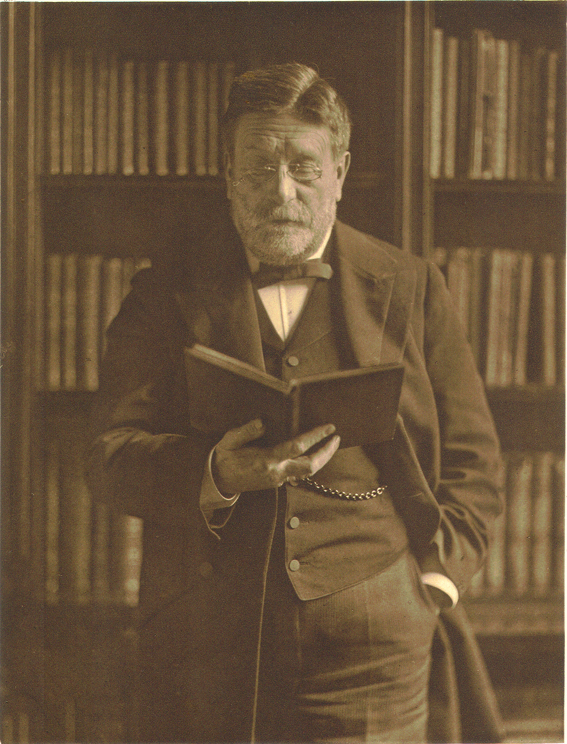 Ullrich Philipp Moller (1836-1926), Hamburger Richter, MdHB